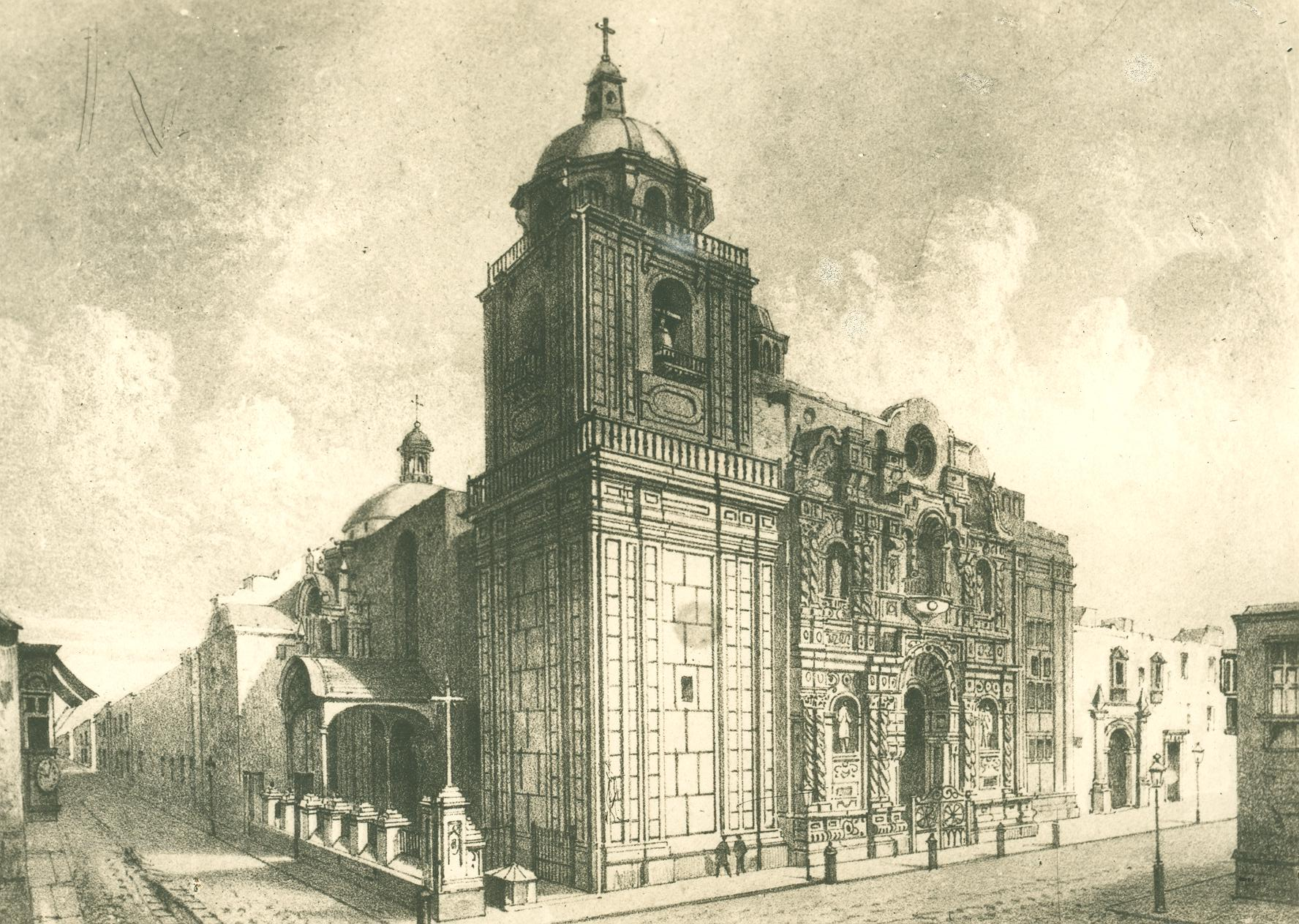 Grabado que muestra a la Iglesia de la Merced, en el jirón de la Unión y la calle de Jesús Nazareno, en el siglo XIX